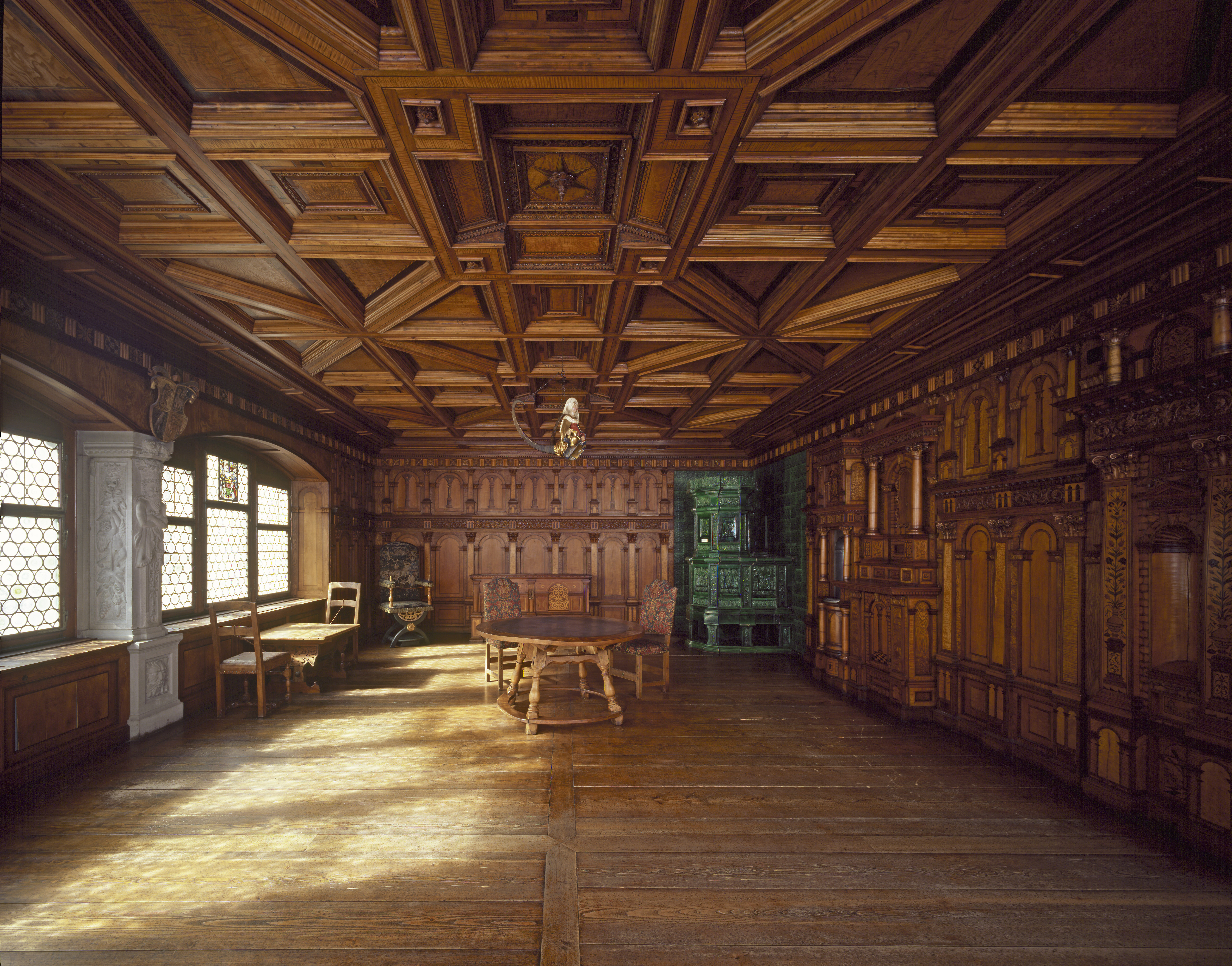 Historisches und Völkerkundemuseum St. Gallen: Period Room Opsersaal. Repräsentationsstube aus dem Jahre 1580 von Fürstabt Joachim Opser aus dem Hof Wil.